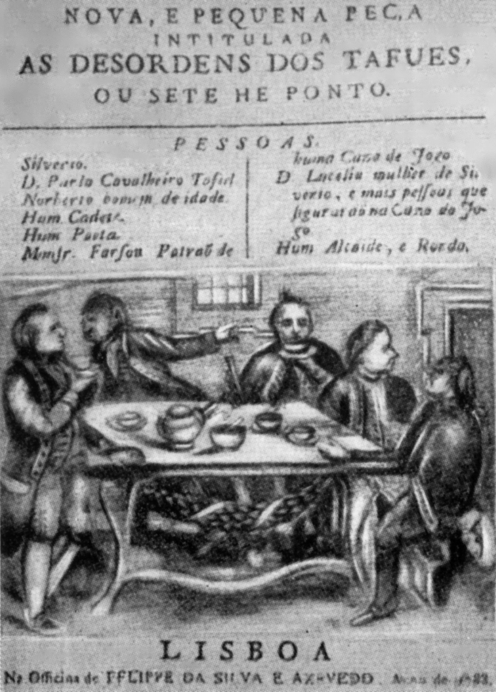 Frontispício de obra do escritor português Nicolau Tolentino de Almeida.